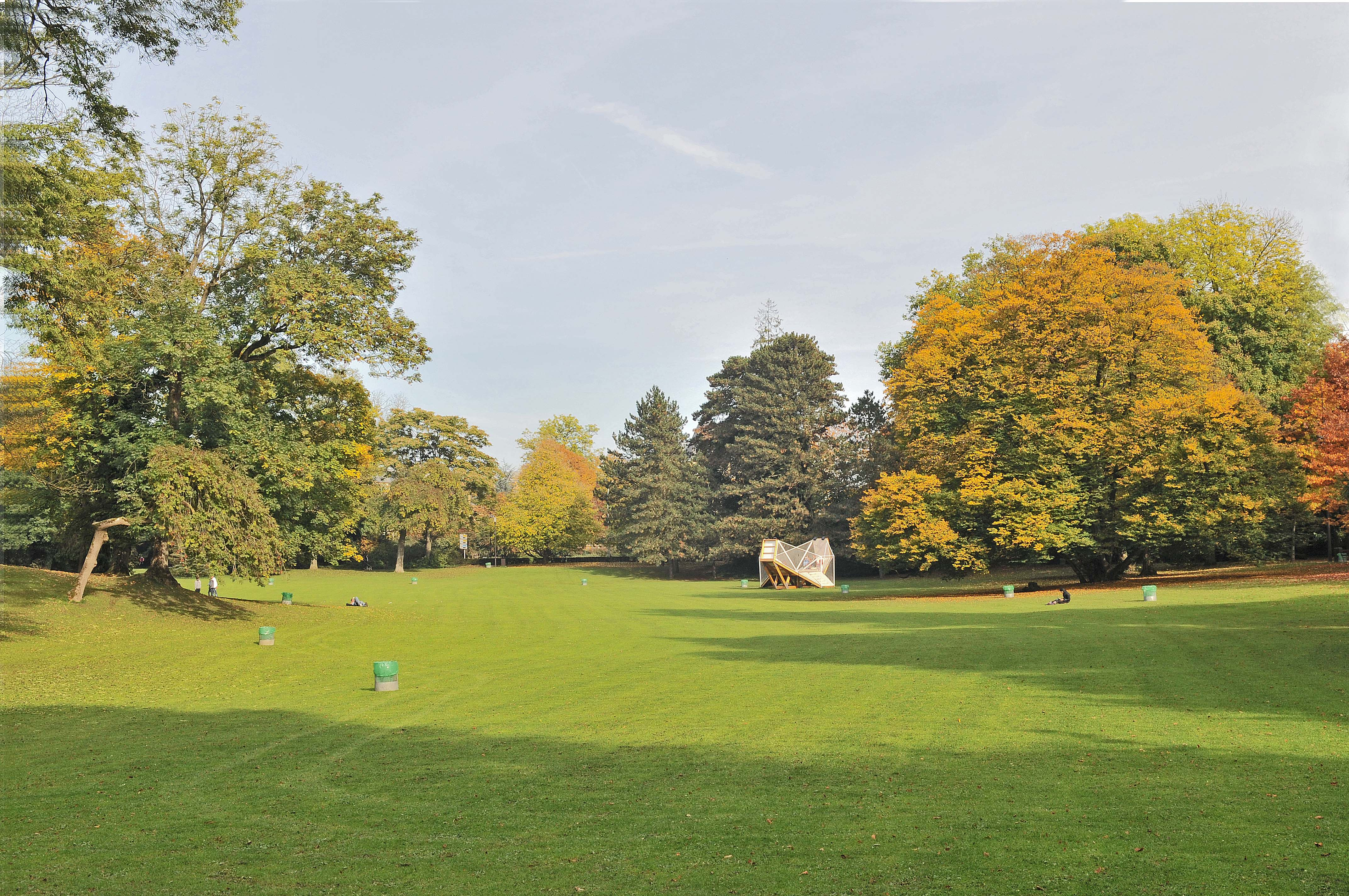 Kinnekswiss am Park vun der Stad Lëtzebuerg.